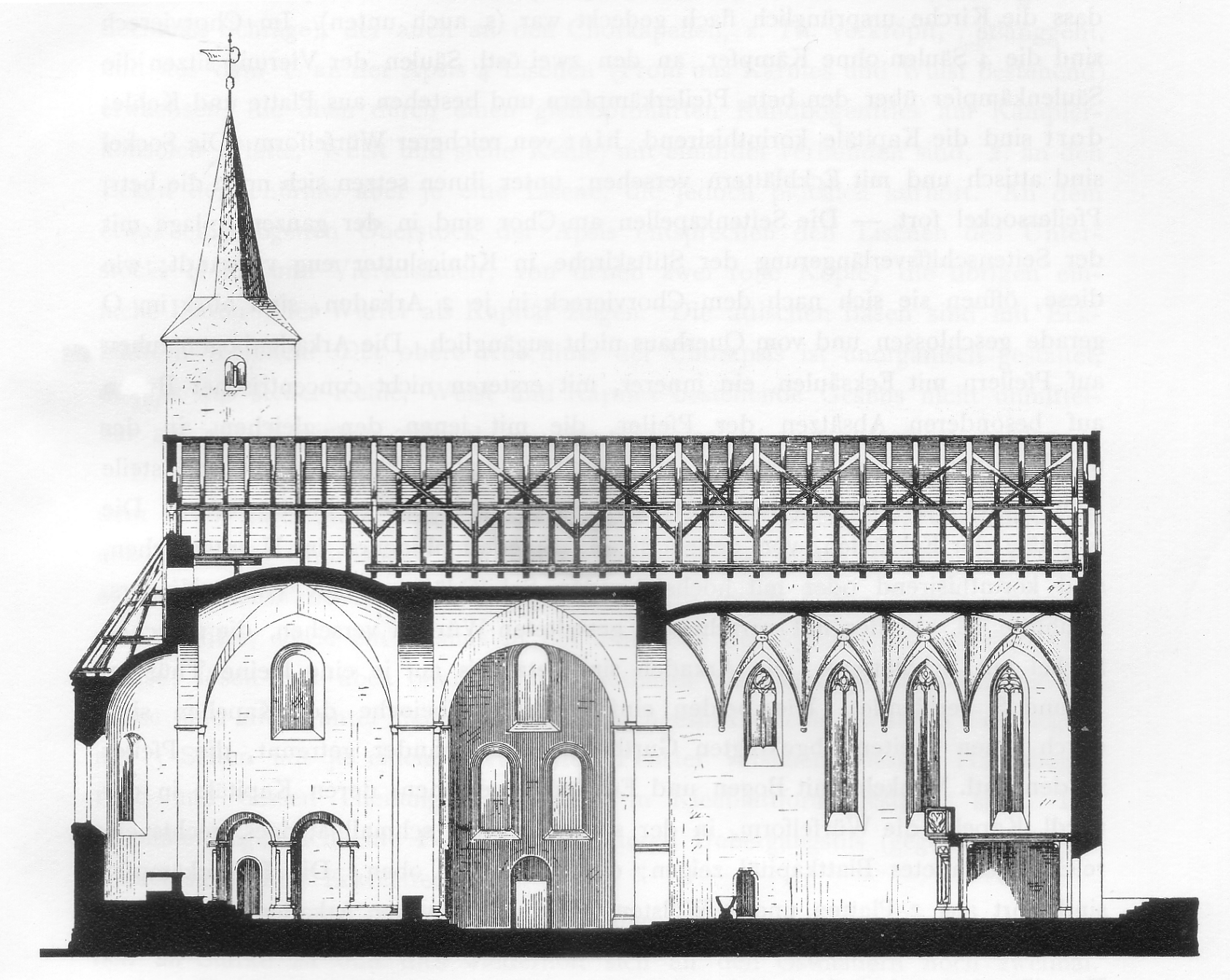 St. Lorenz (Schöningen)